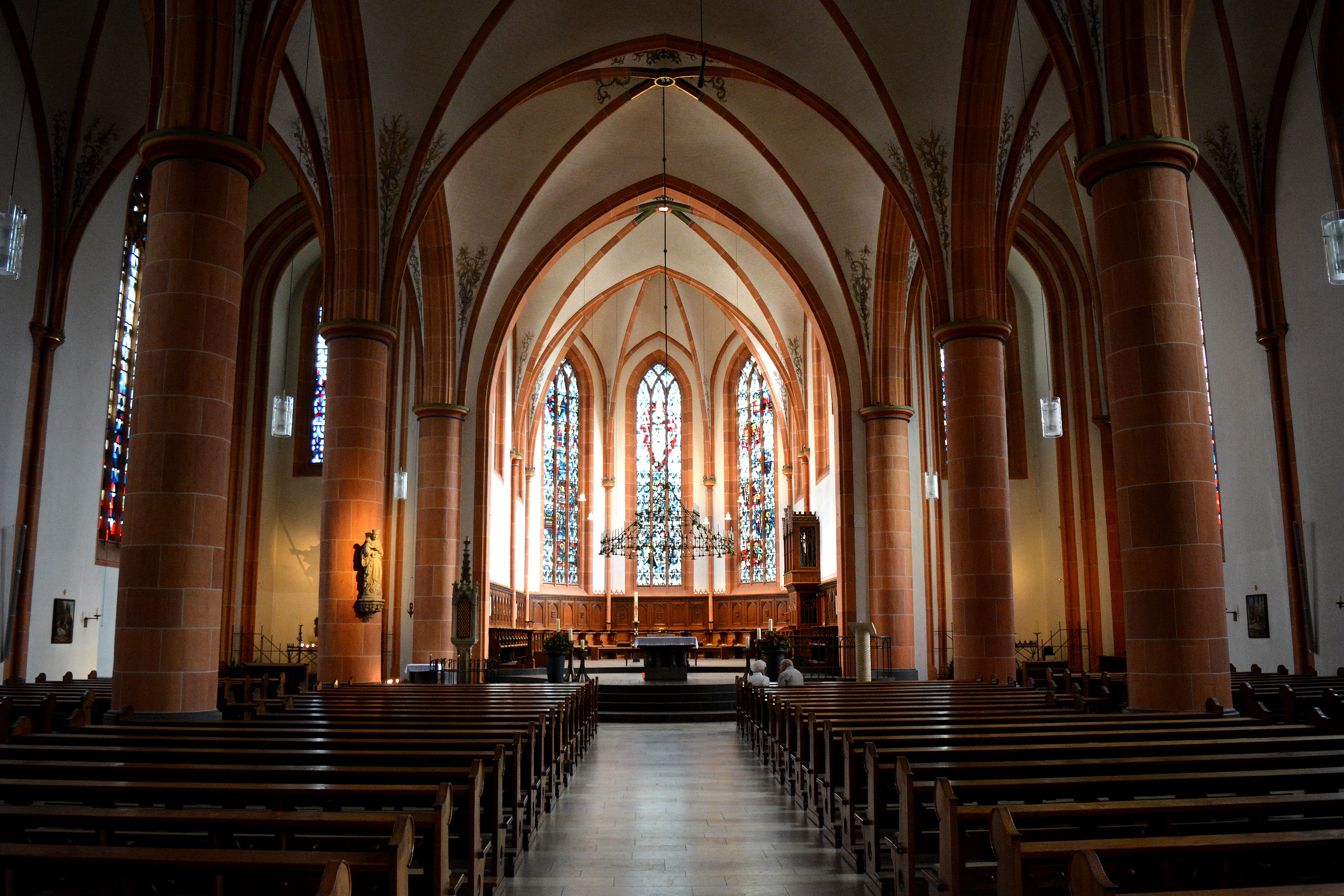 St. Remigius (Borken), Innenansicht